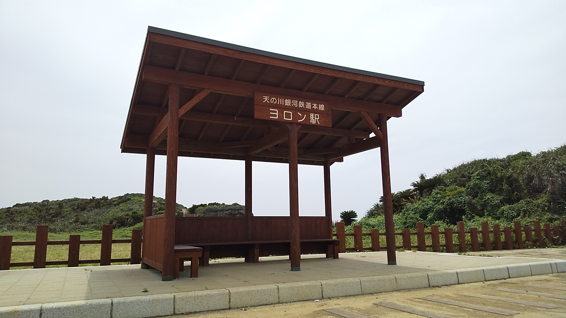 木製ベンチ